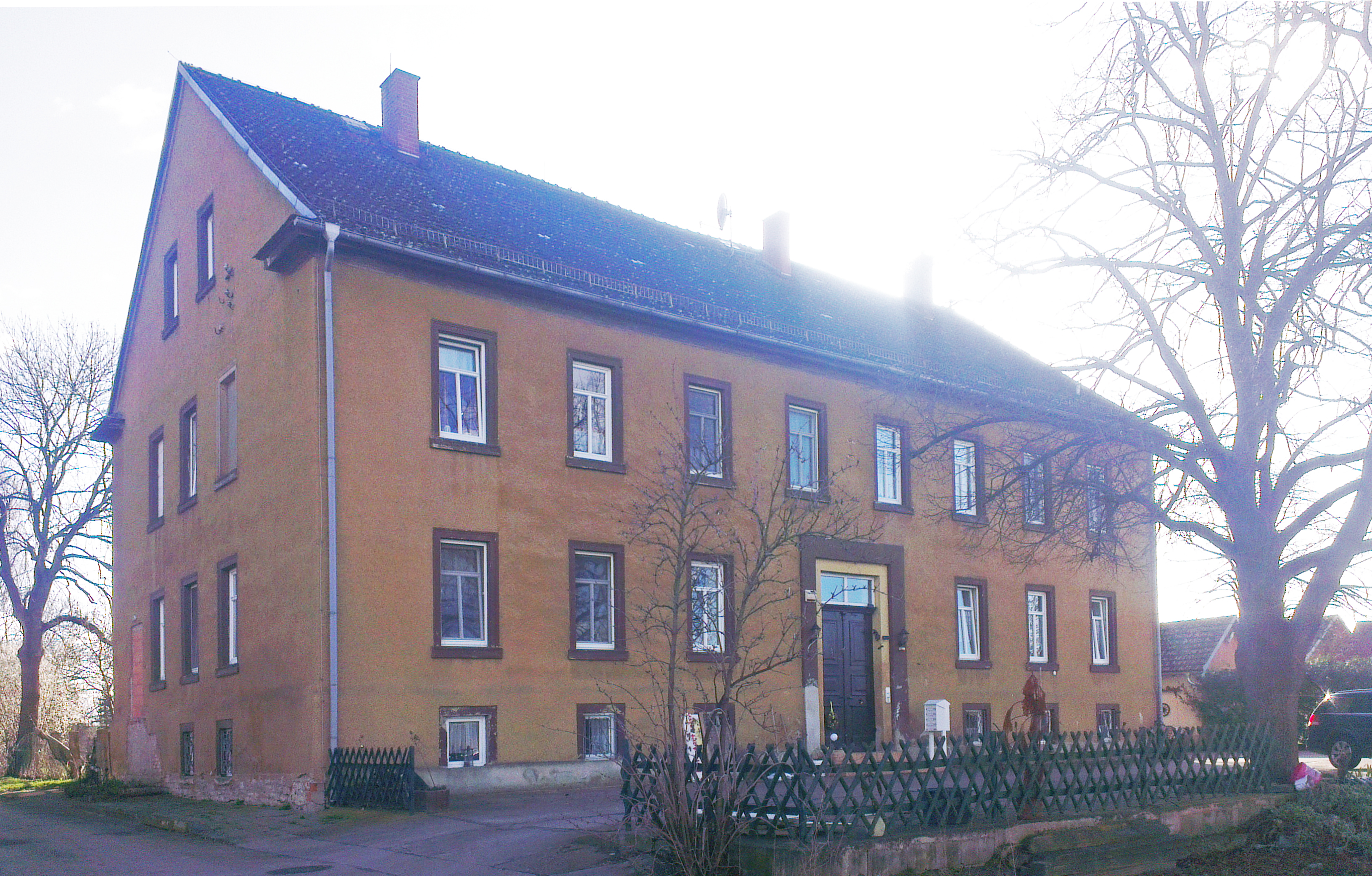 Das Gutshaus Frohndorf, erbaut im 19. Jahrhundert auf der Stelle eines Renaissancebaus. Heutiger Zustand (2016) Privatbesitz (Wohnhaus).